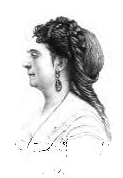 Marie-Lætitia Bonaparte-Wyse, portrait en frontispice de son livre Cara patria: échos italiens, Librairie des Bibliophiles, 1873 [1]